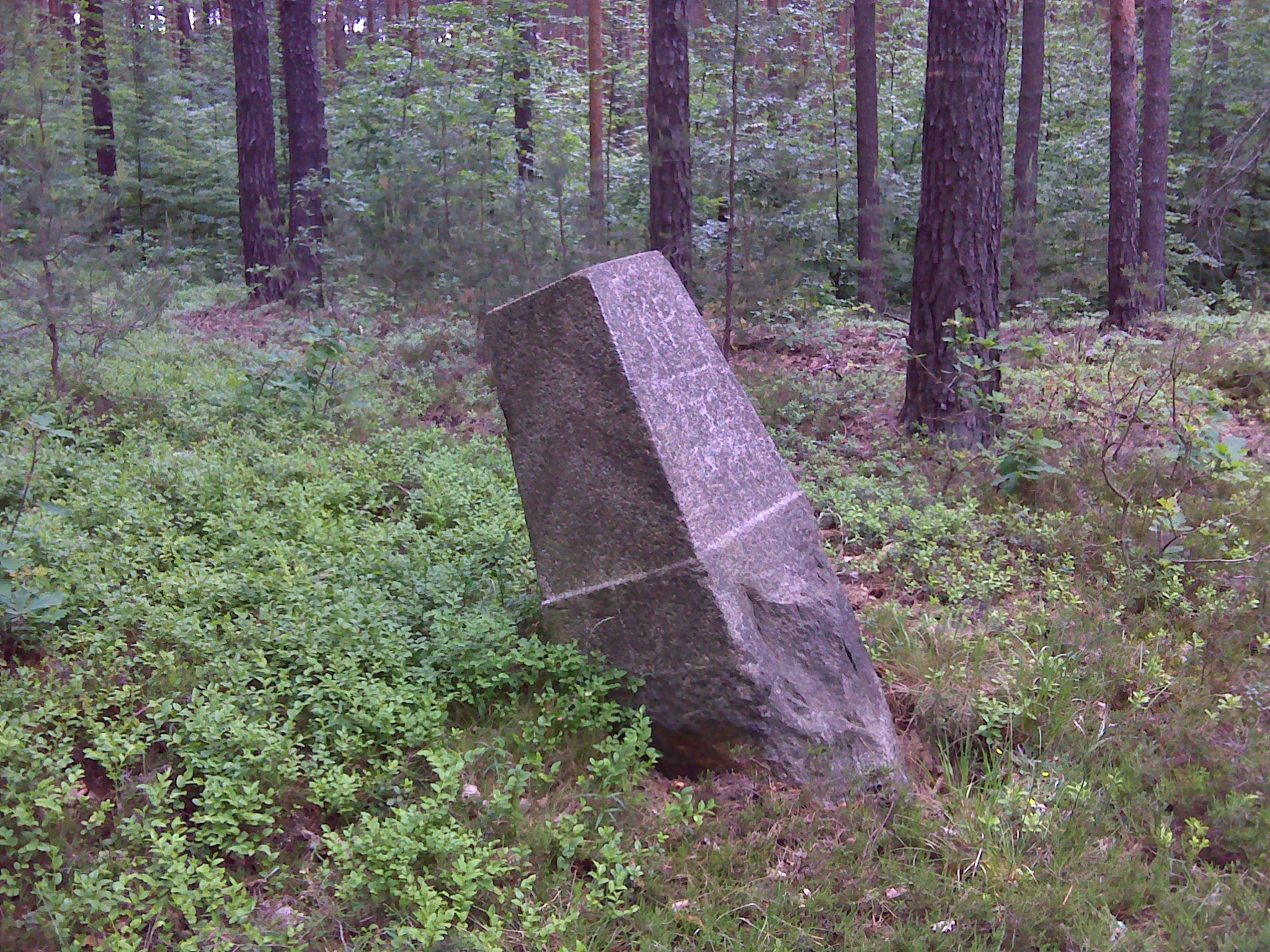 Historischer Grenzstein Nr. 132 der sächsisch-preußischen Grenze 1815 Hornjoserbsce: Historiski saksko-pruski měznik čo. 132 w holi wuchodnje Njedźichowa